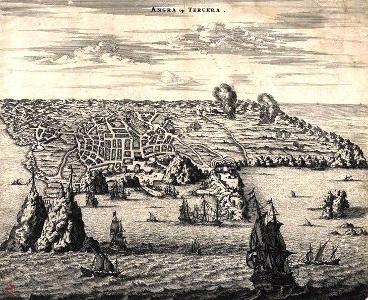 "Angra op Tercera", gravura da baía e cidade de Angra (atual Angra do Heroísmo) na ilha Terceira, Açores.